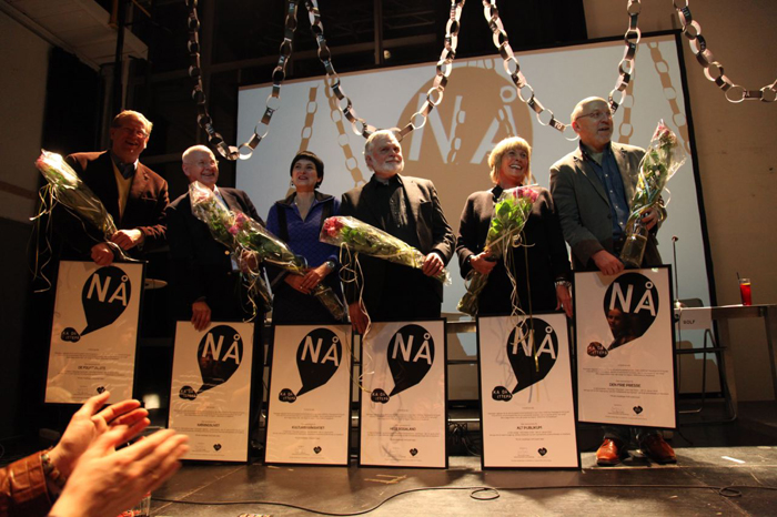 Åpnng av ittepåland, Tou Scene, utdeling av borgerbevis